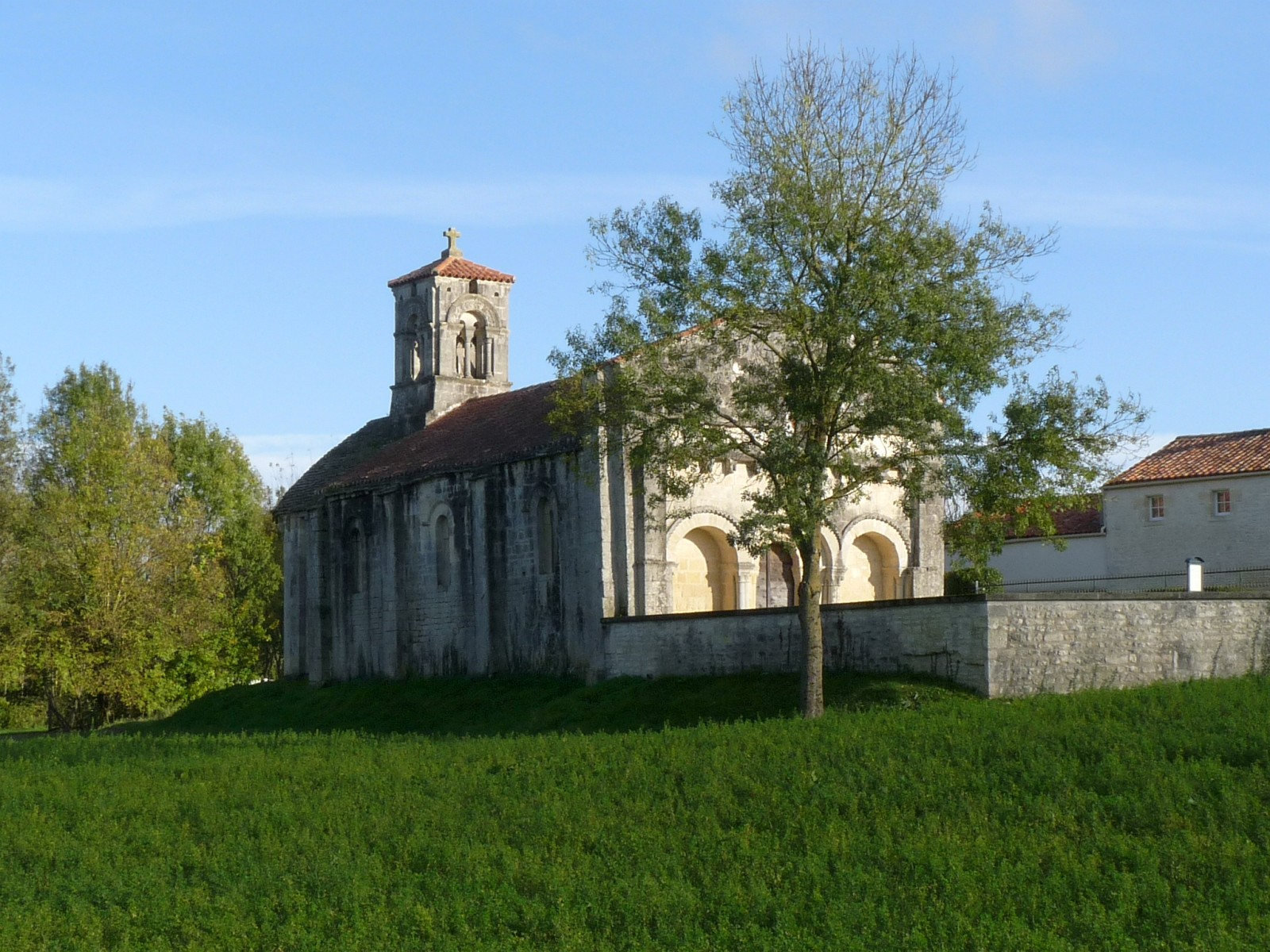 Eglise de St-Ouen-la-Thène, Charente-Maritime, France